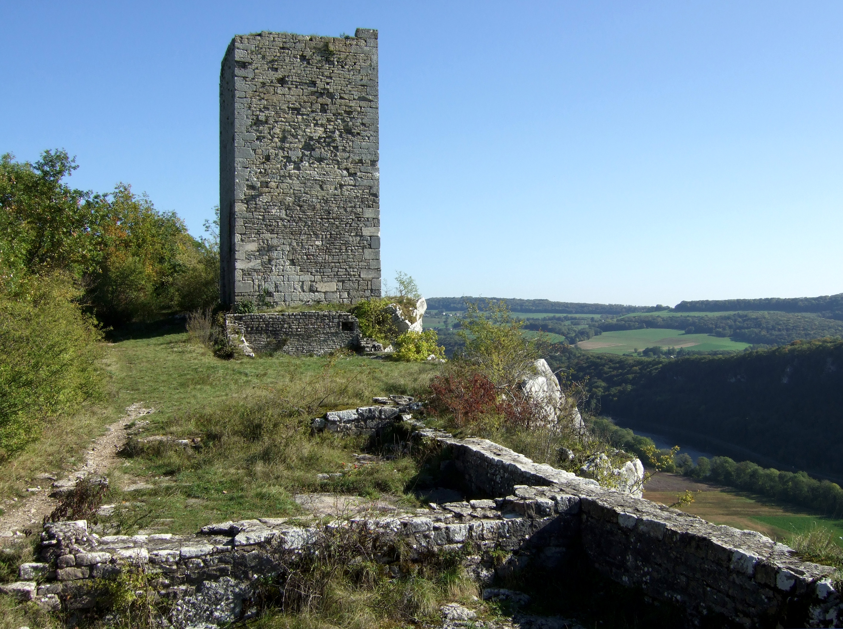 Château de Montferrand-le-Château (empreinte du bâti au sol avec vue sue le donjon/tour)